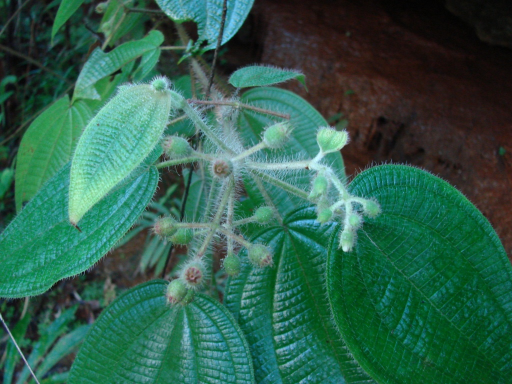 Clidemia octona (Bonpl.) L.O.Williams - MELASTOMATACEAE Parque Nacional da Chapada dos Veadeiros - Alto Paraíso de Goiás - Goiás - Brasil.